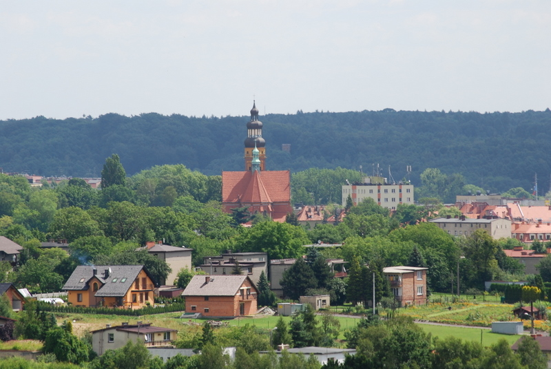 Wodzisław - Widok na Stare Miasto od strony Jedłownika.